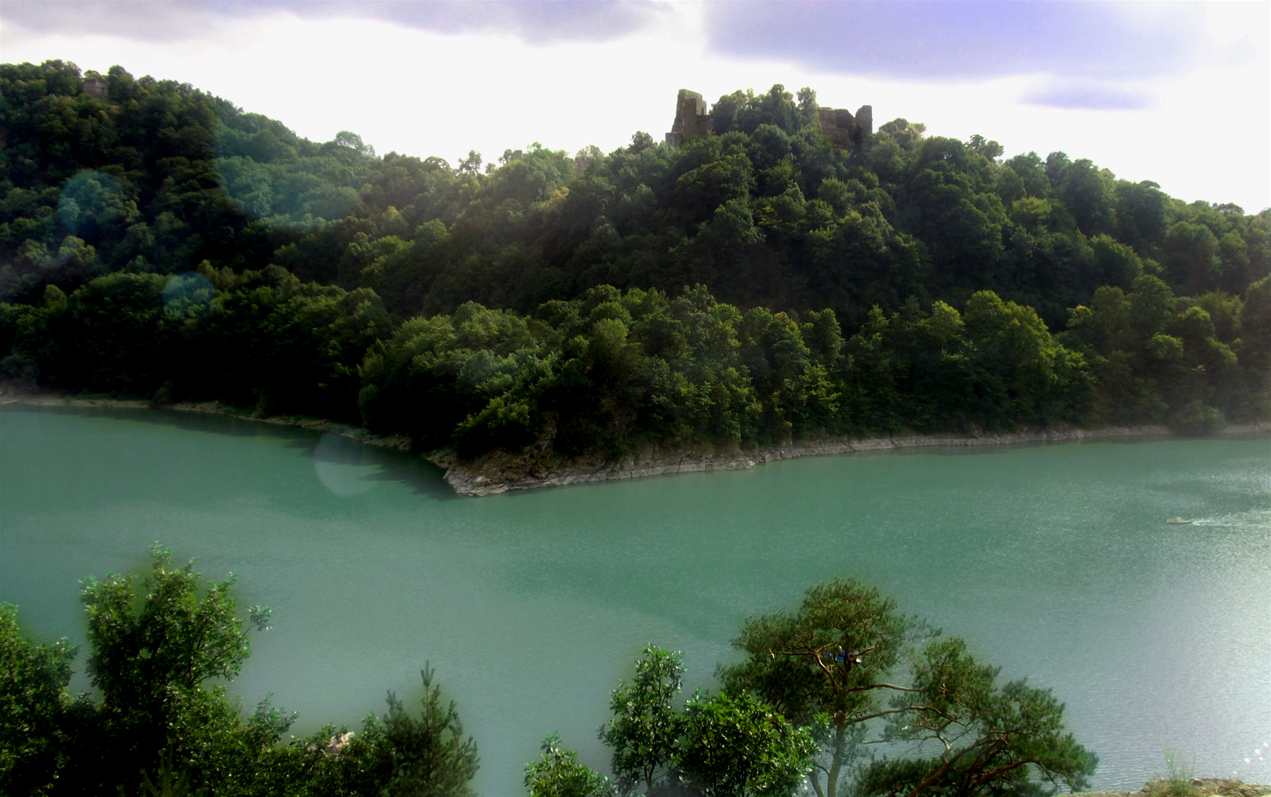 Fotografie z vyhlídky na zříceninu Hradu Cornštejn nad Vranovskou přehradou.